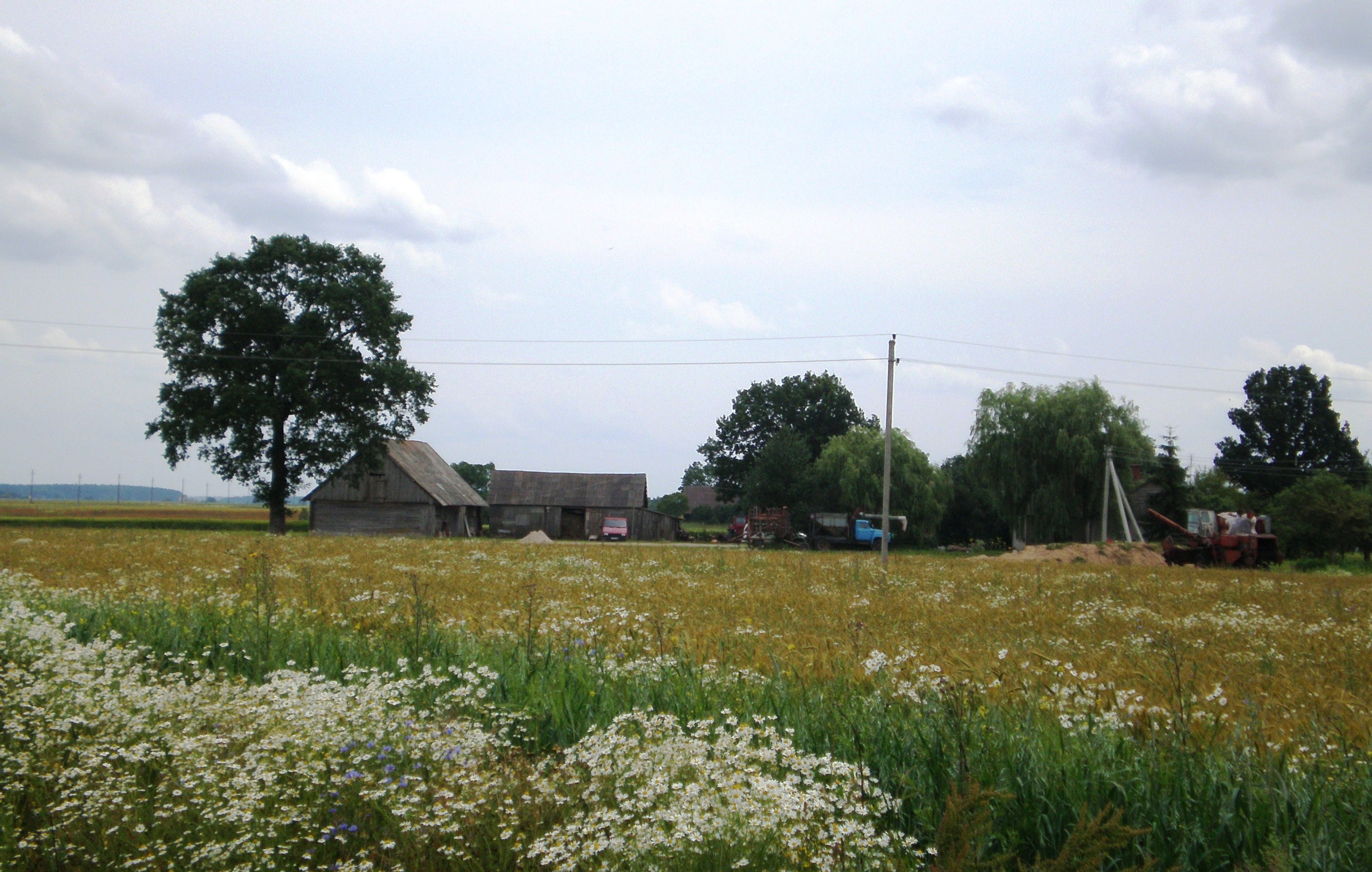 Varnupė, Kėdainių raj.